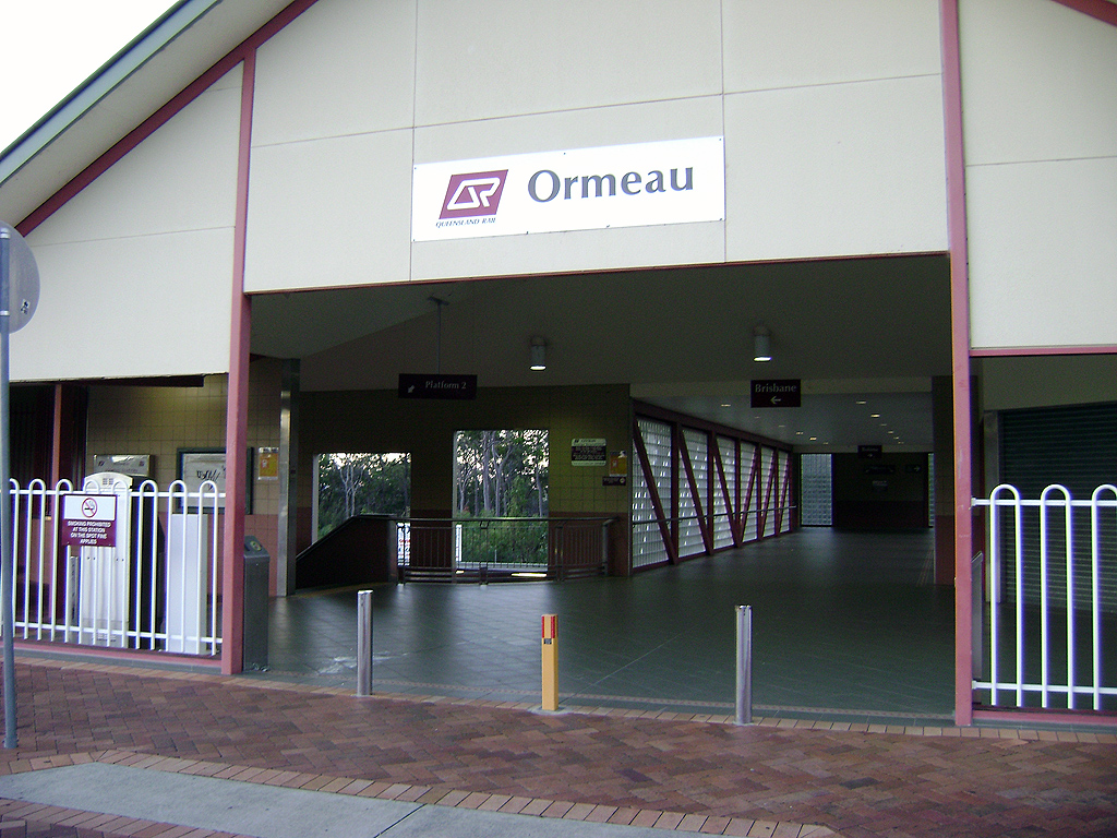 QR Ormeau Station in Pimpama, Queensland entrance.